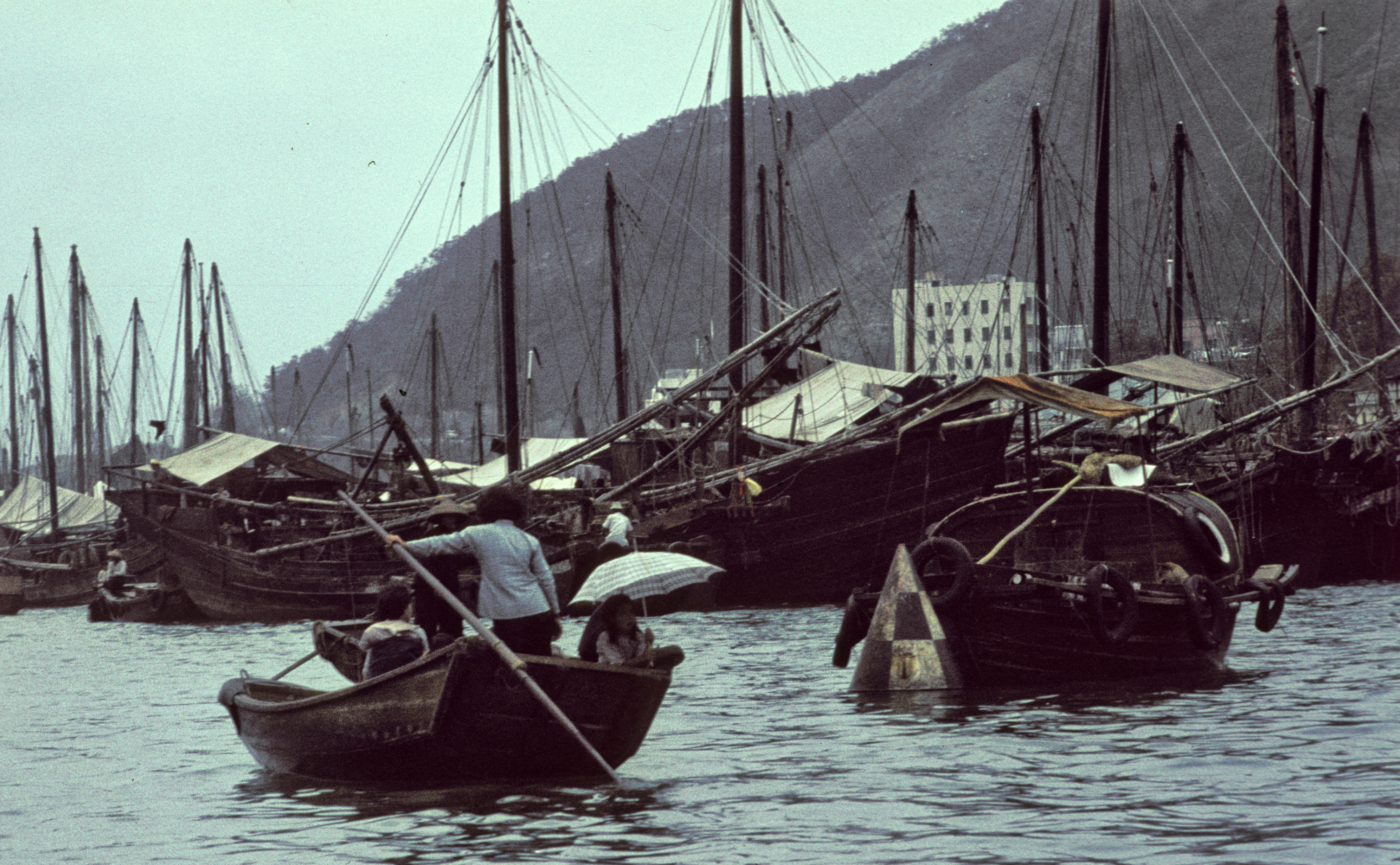 Hong Kong